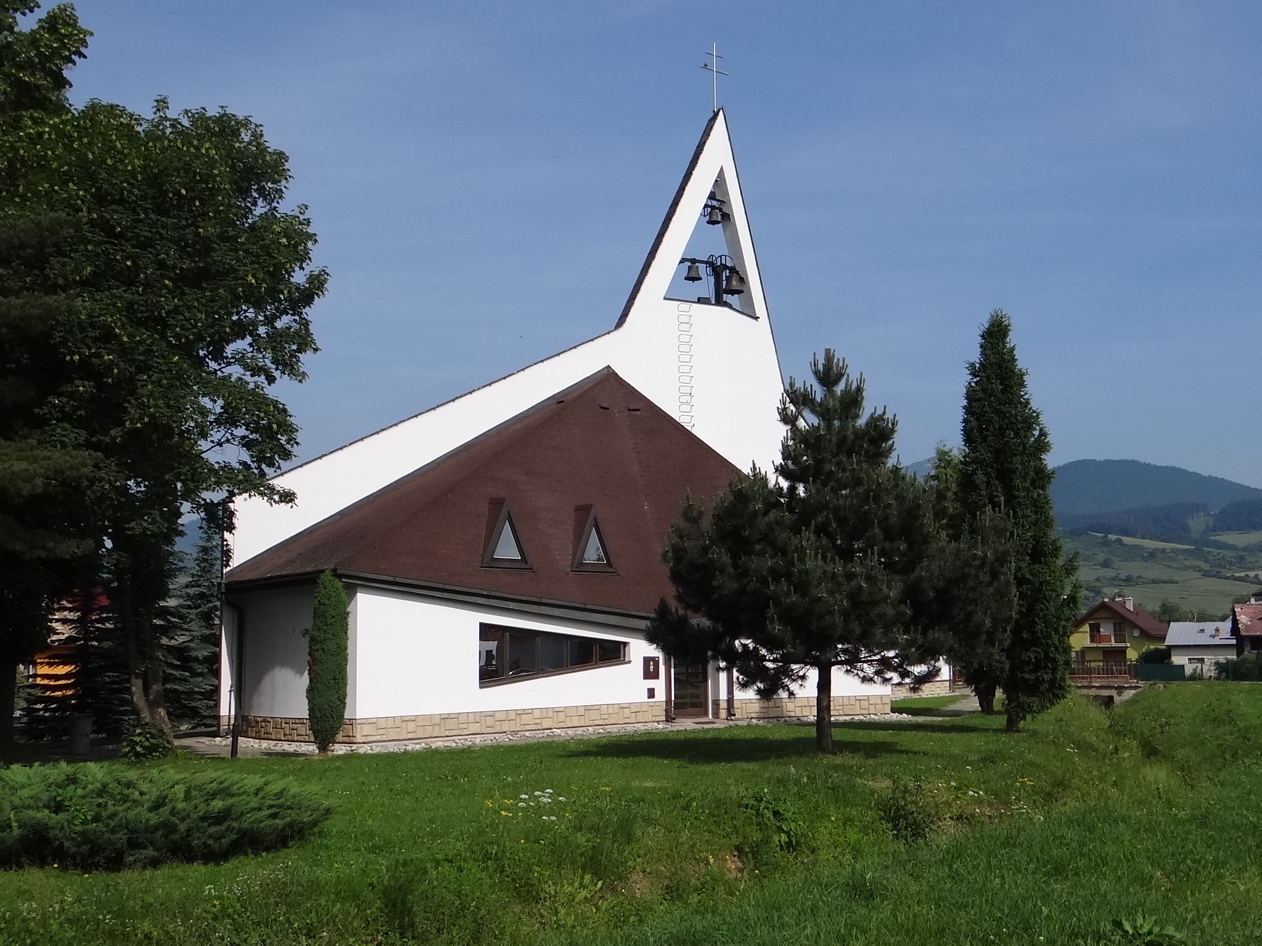 Ivachnová